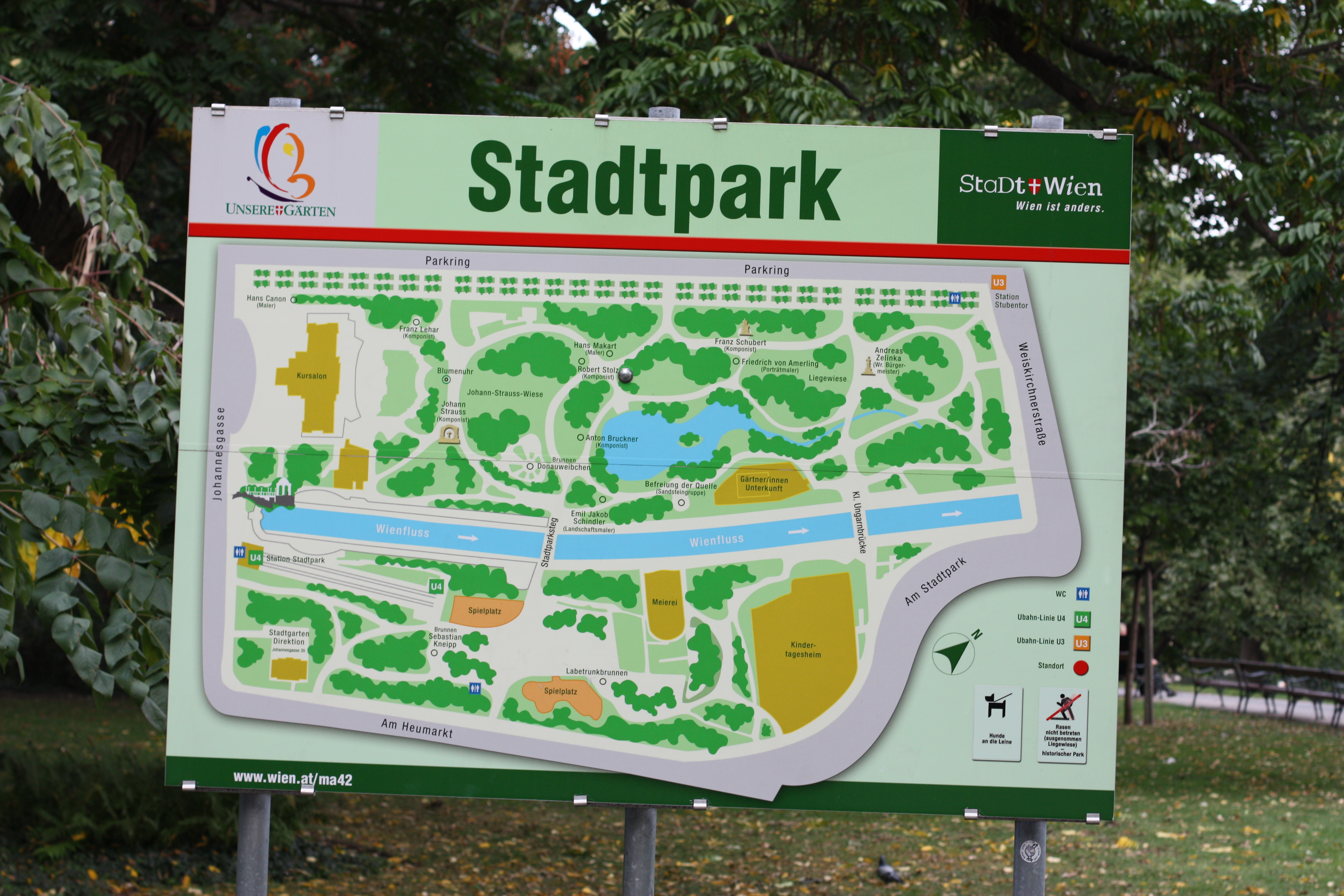 Wiener Stadtpark, Stadtpark Wien Wien, 2009